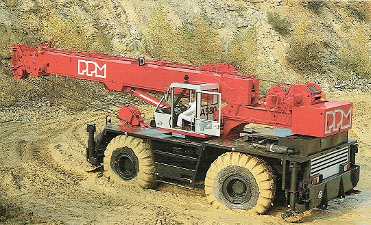 Ruw terrein kraan PPM A 580